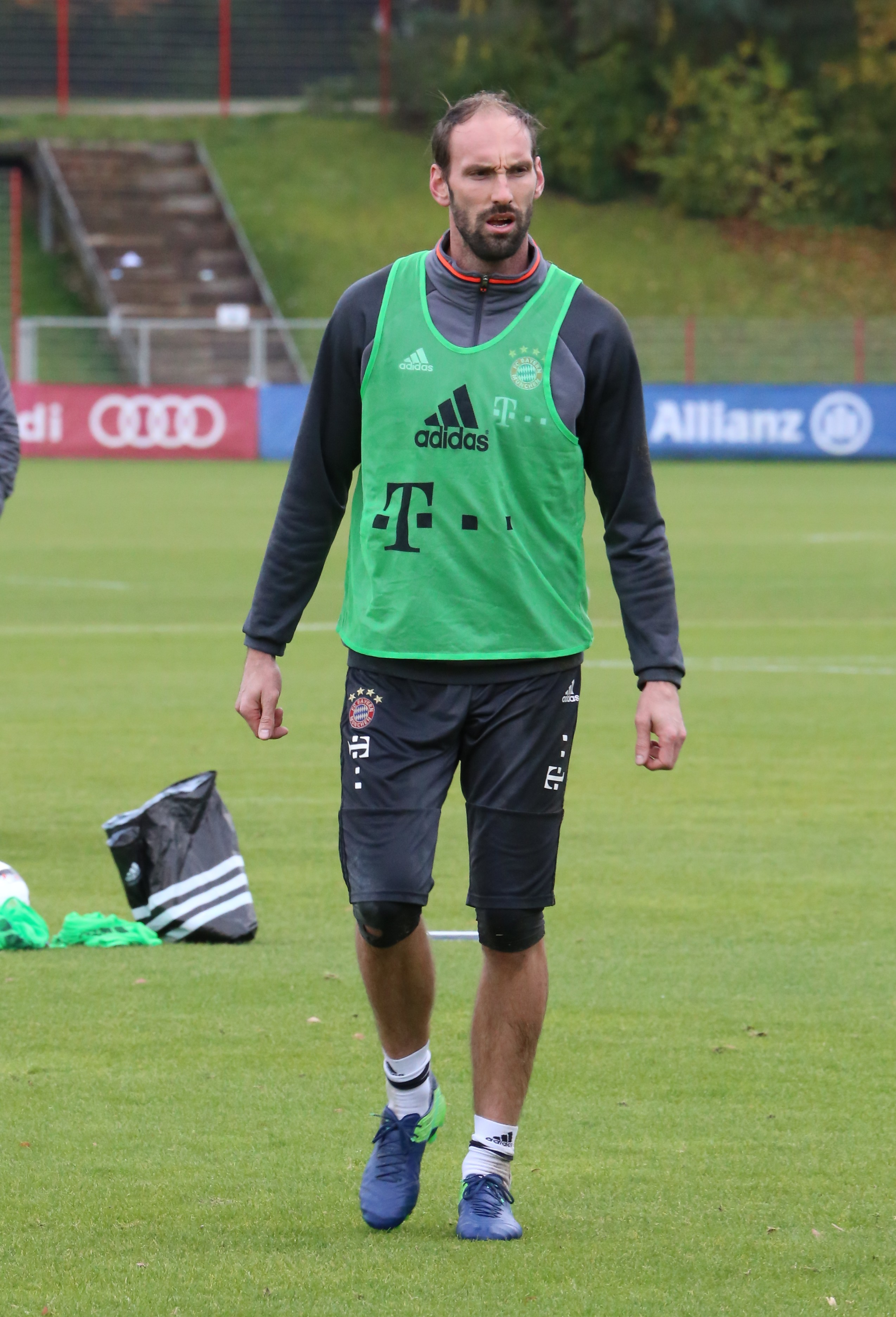 Tom Starke beim Training auf dem Gelände des FC Bayern München (November 2016)